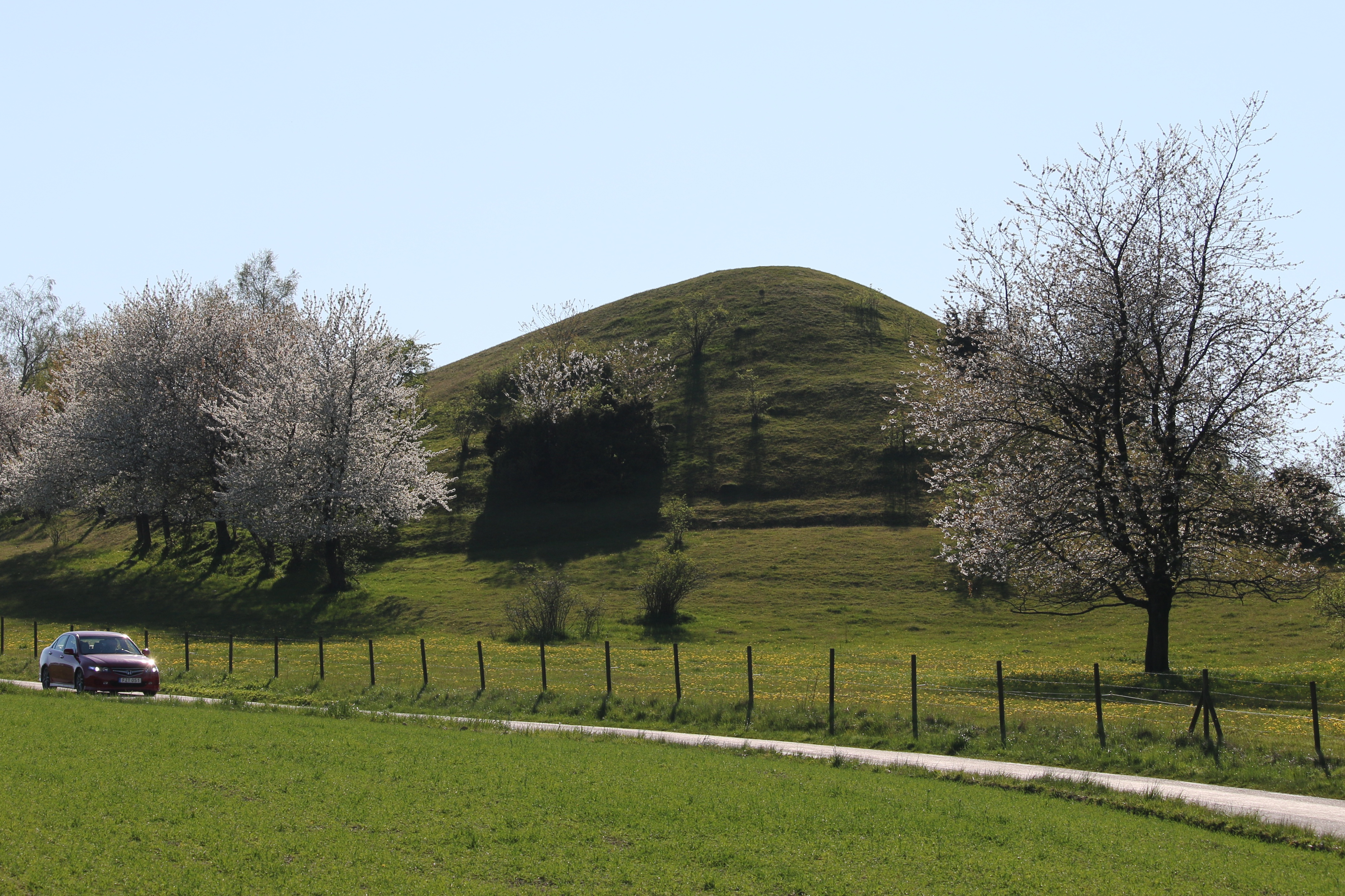 Ramnakullabackarna